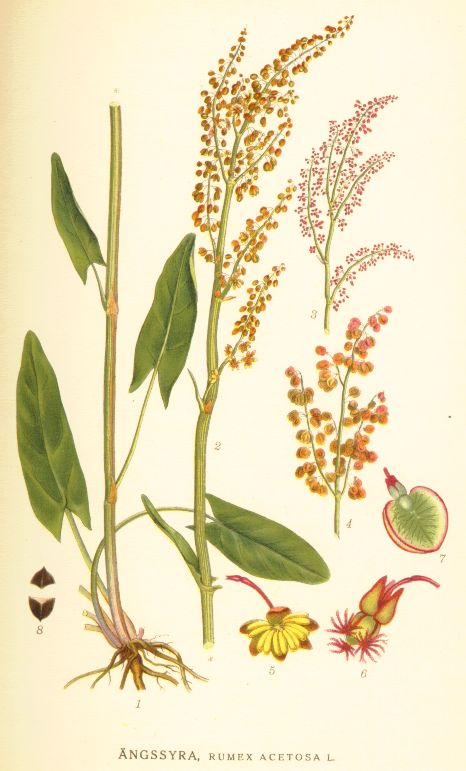 Rumex acetosa